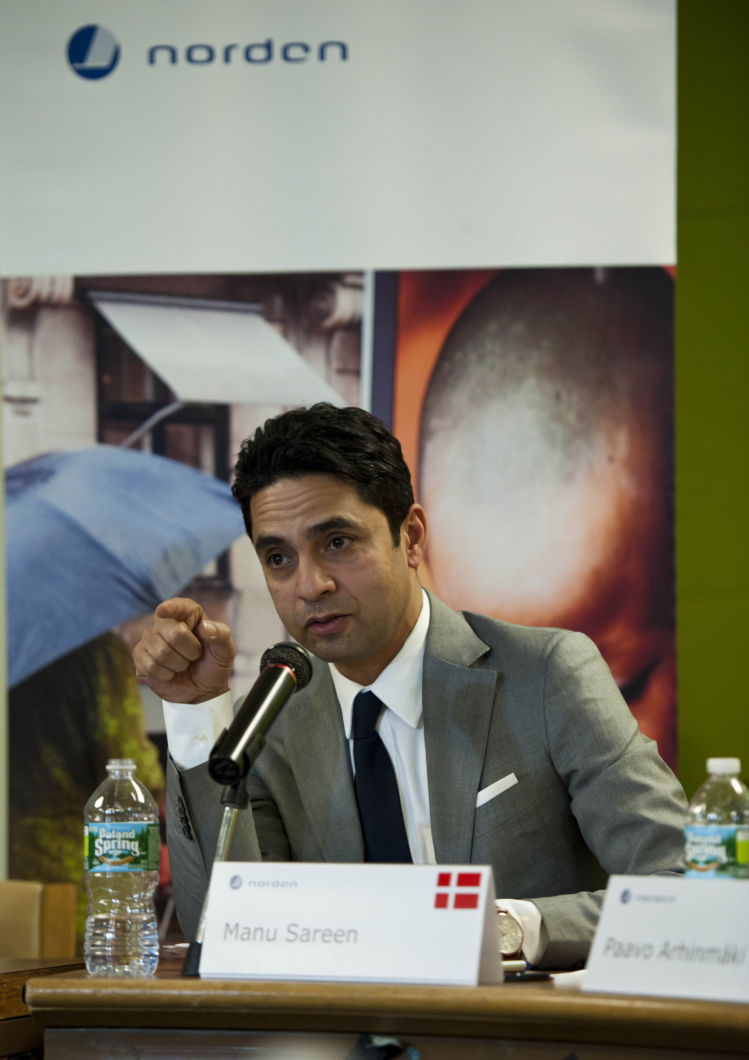 Danmarks ligestillingsminister Manu Sareen under FN's Kvindekommissions samling (CSW) 2013